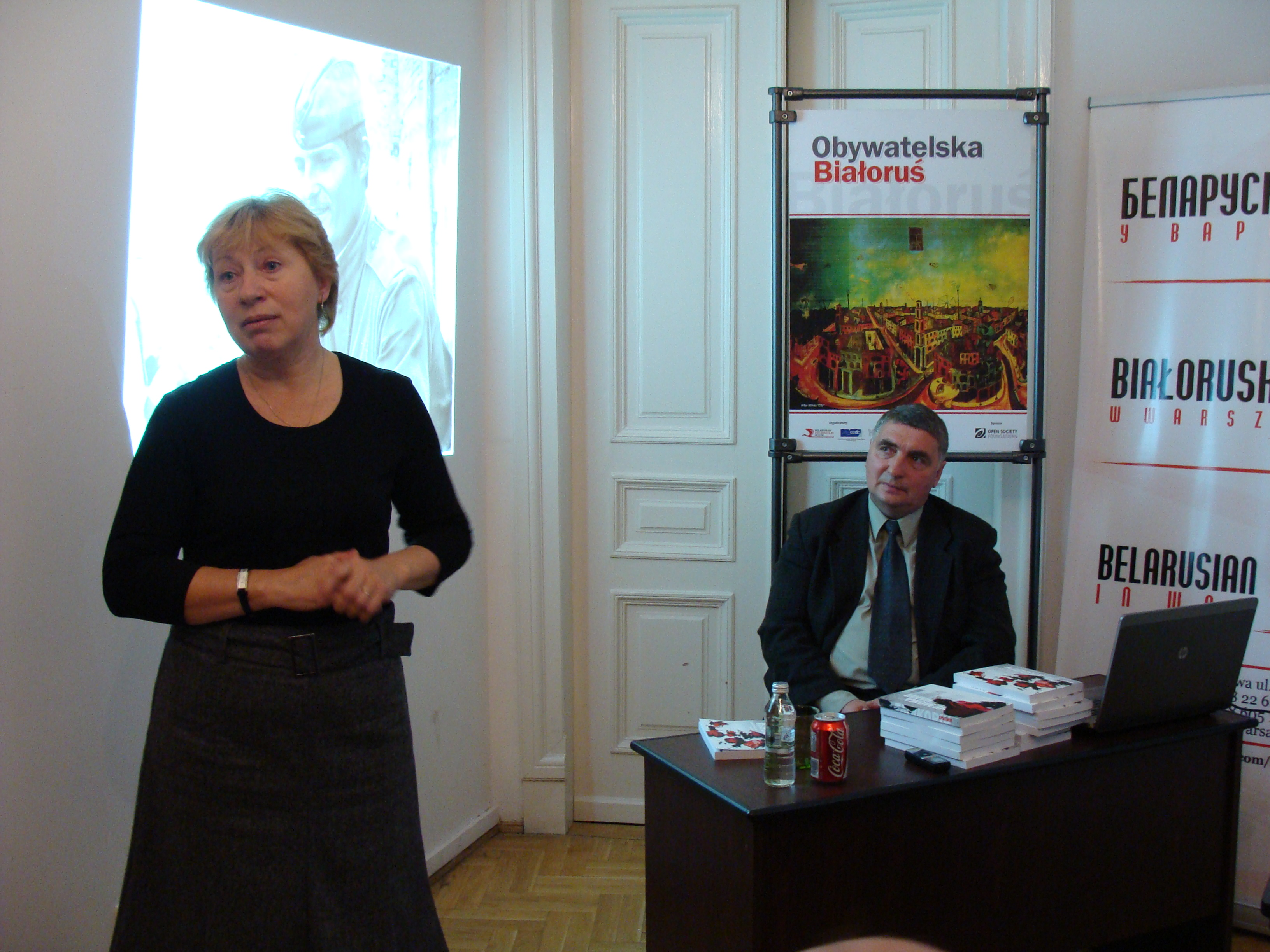 Alaksandr Tamkowicz podczas prezentacji książki "Arytmija, albo Kod supraciwu" w Białoruskim Domu w Warszawie.